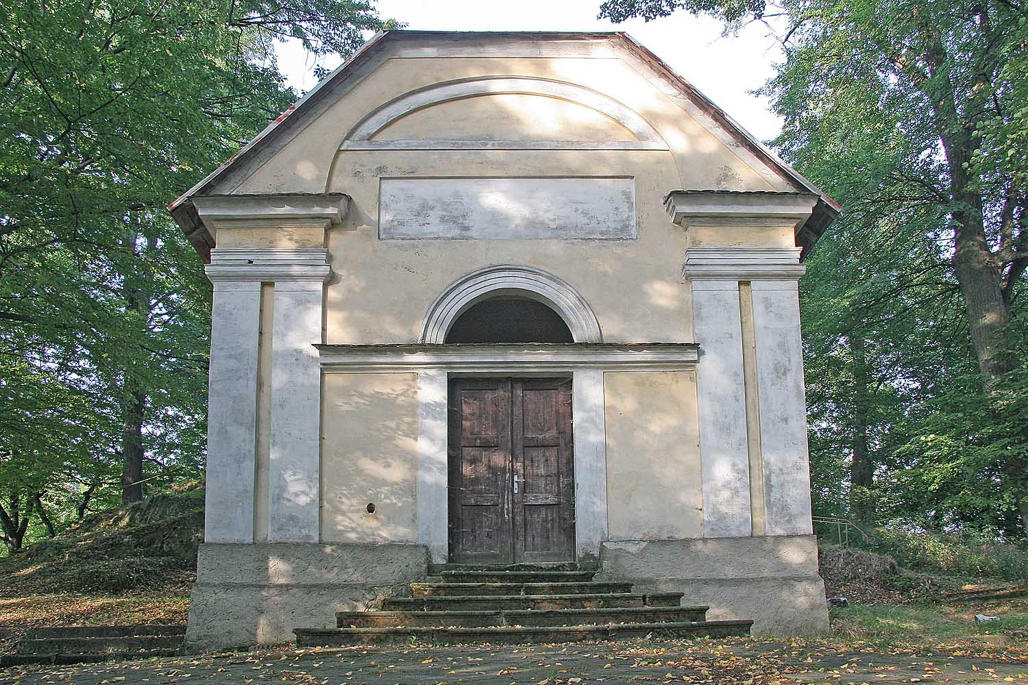 Kaple nad Křížovou cestou nad Cvikovem, okres Česká Lípa autor:Prazak date:20. 9. 2006